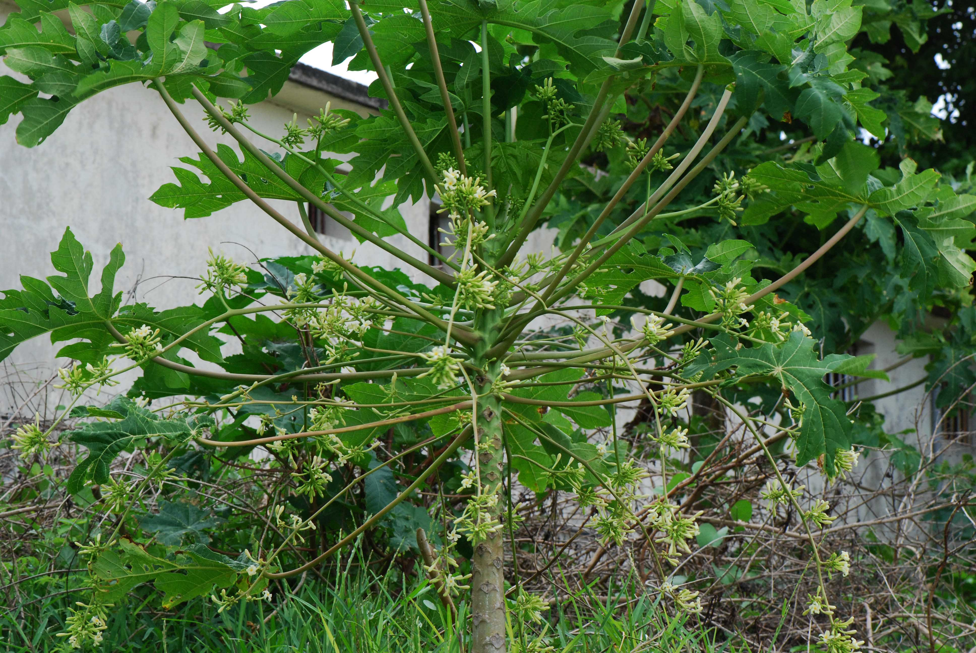 Carica papaya, papayer mâle, Grand Gaube, Ile Maurice